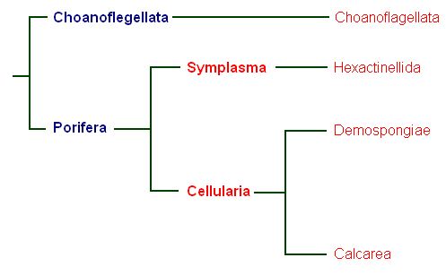 Cladogram of phylum Porifera